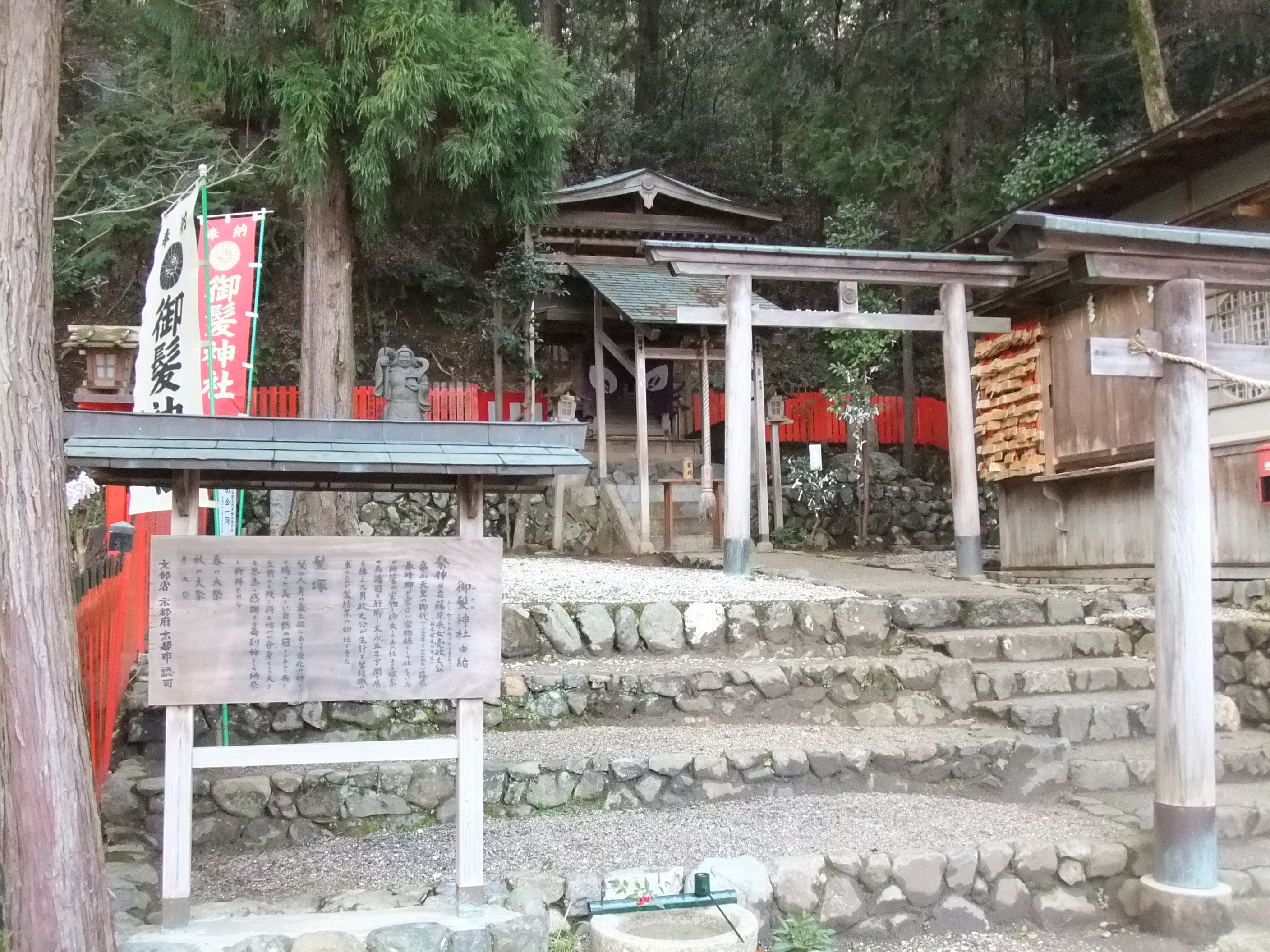 御髪神社（嵯峨野）